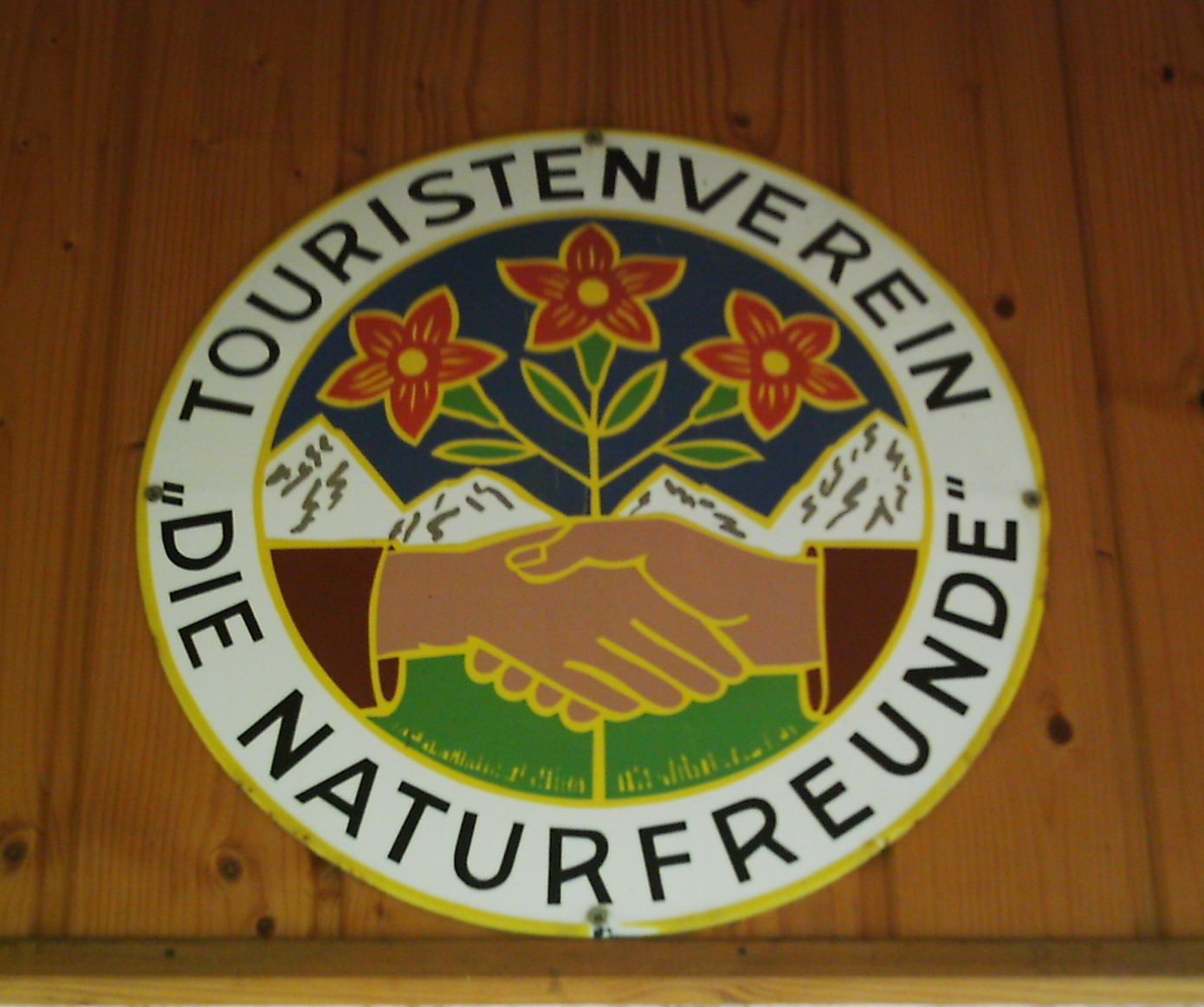 Schild der Naturfreunde über dem Naturfreunde-Haus Boßler-Hütte oberhalb von Gruibingen, Schwäbische Alb, Baden-Württemberg, Deutschland